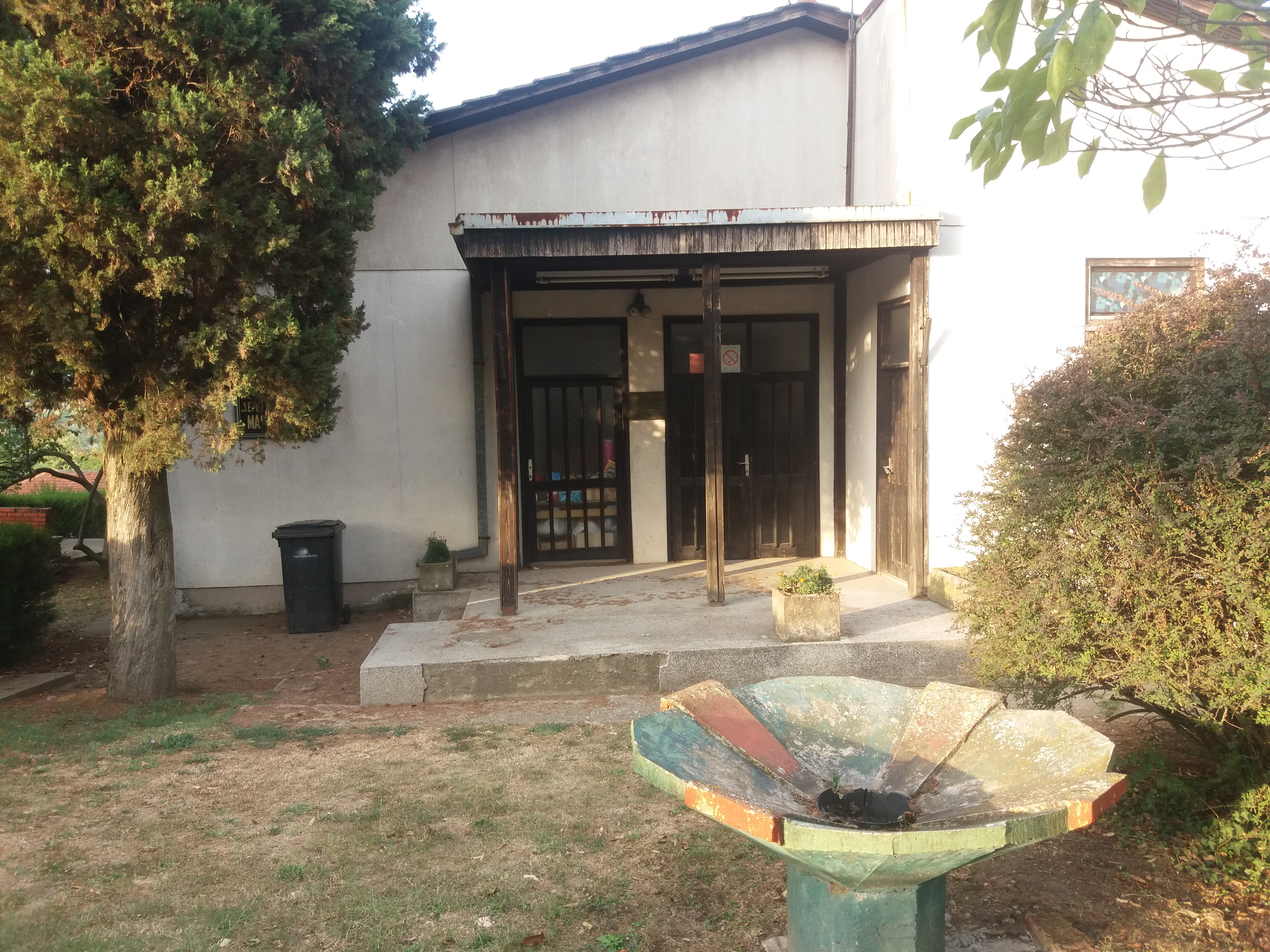 Škola u Maloj Plani (Smederevska Palanka)